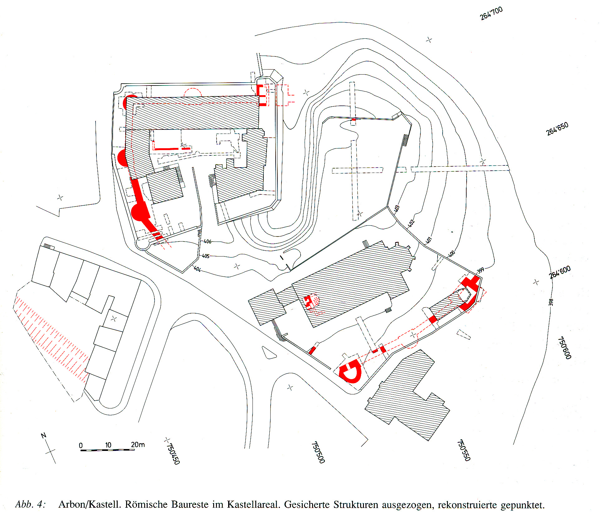 Übersichtsplan des römischen Kastells von Arbon (Graben, Nordtor und Kastellbad) rot:ergrabene Mauern; gepunktet: rekonstruierter Verlauf der Kastellmauer.